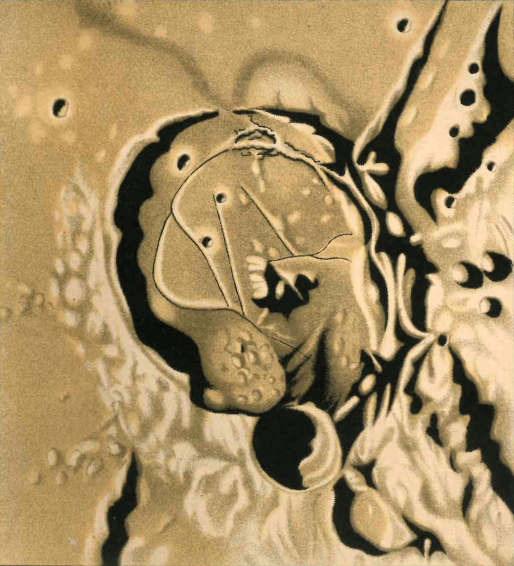 Gassendi, vasto cratere lunare, poco dopo il sorgere del Sole.